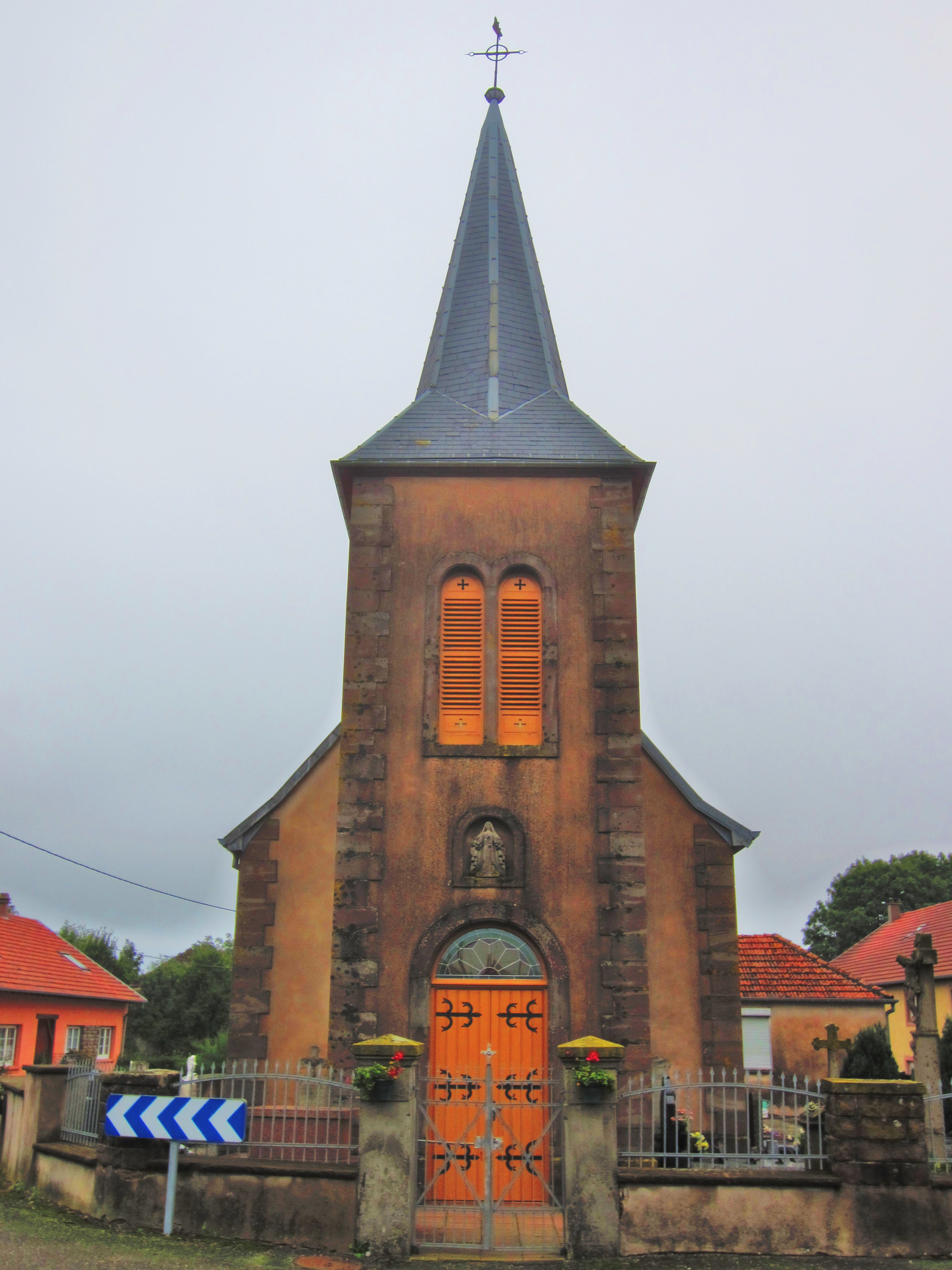 Eglise Bickenholz